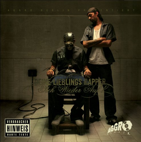 Cover der Single „Steh wieder auf“